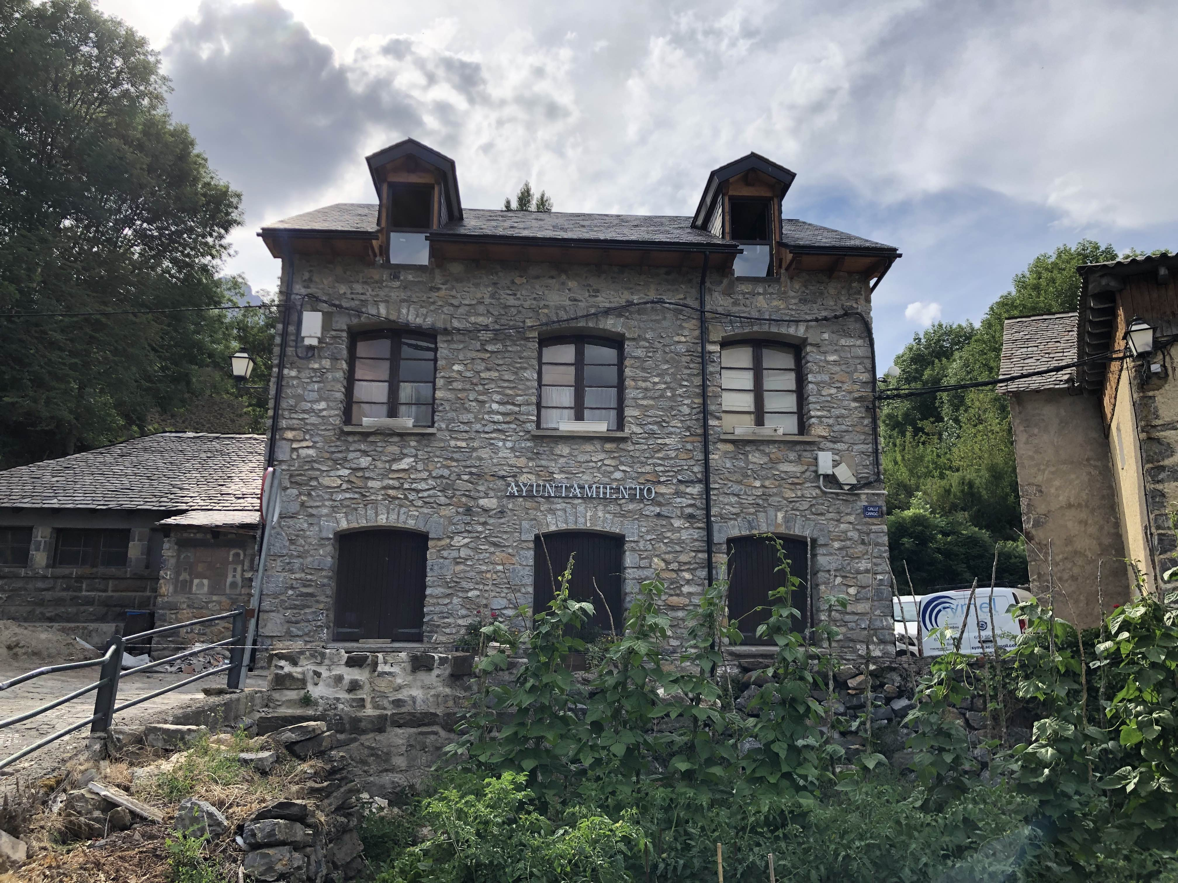 Iglesia de San Andrés, S.XX